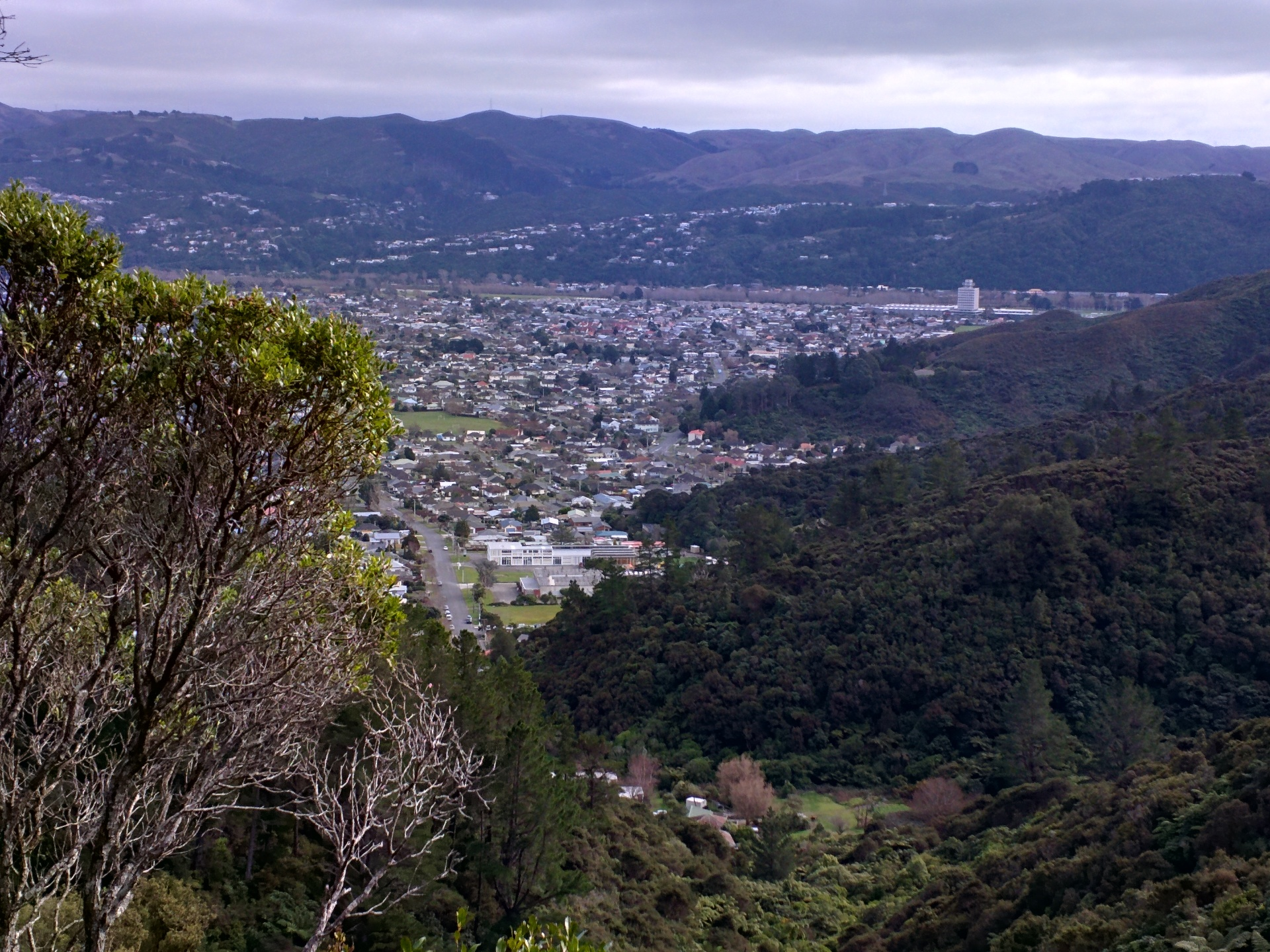 Naenae, Lower Hutt 5011, New Zealand